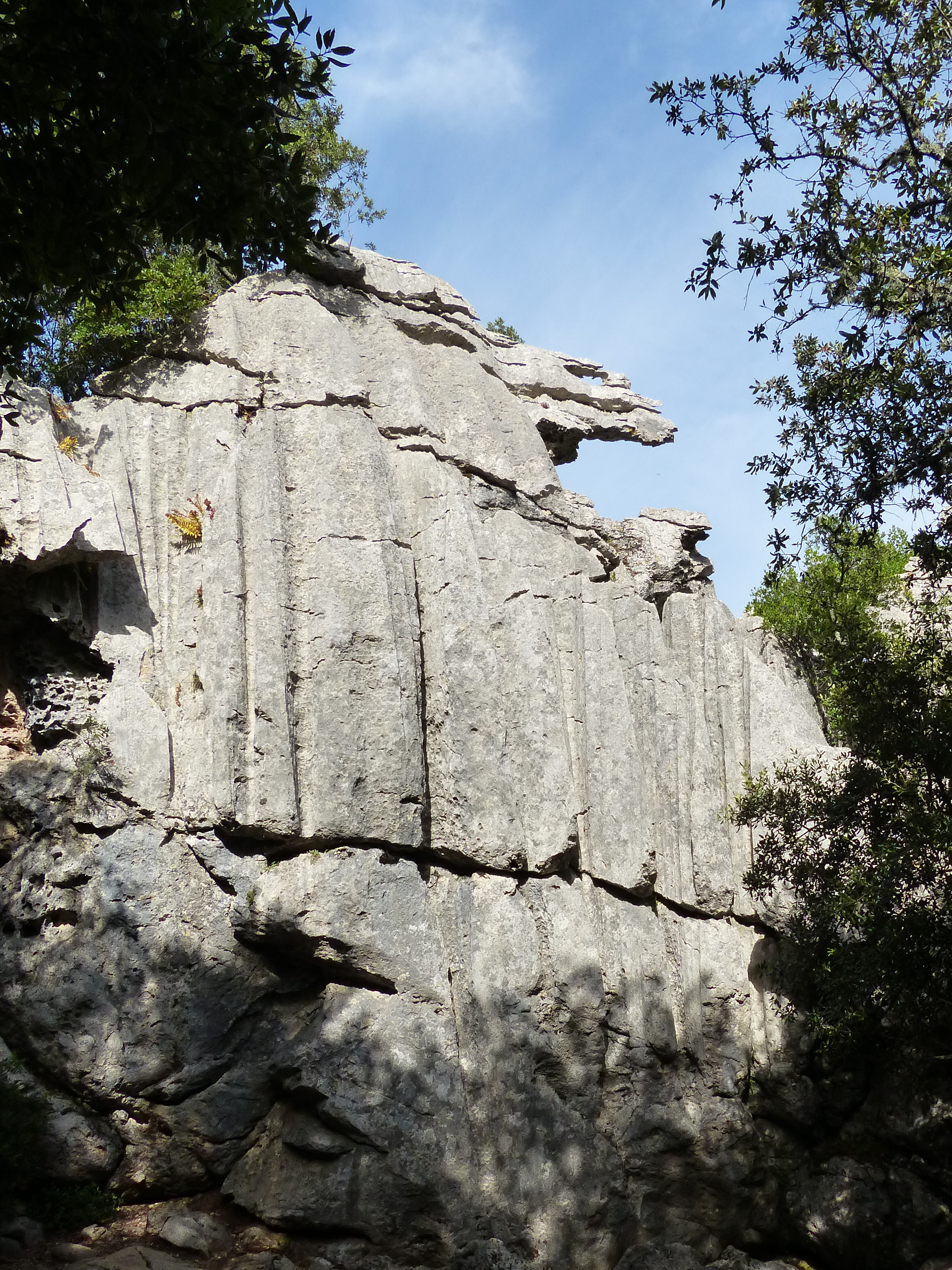 Es Camell